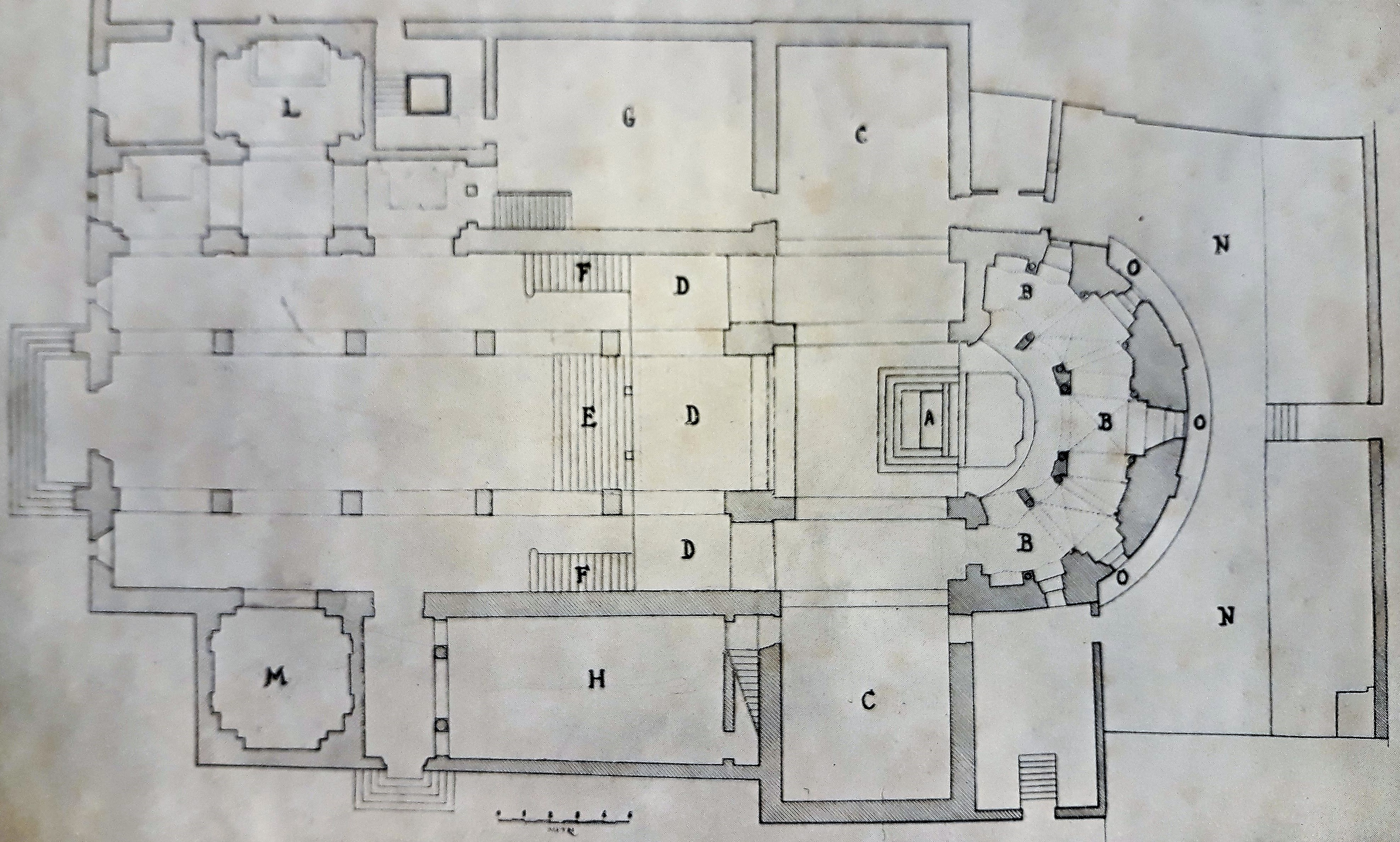 Pianta della chiesa di Santo Stefano a Verona